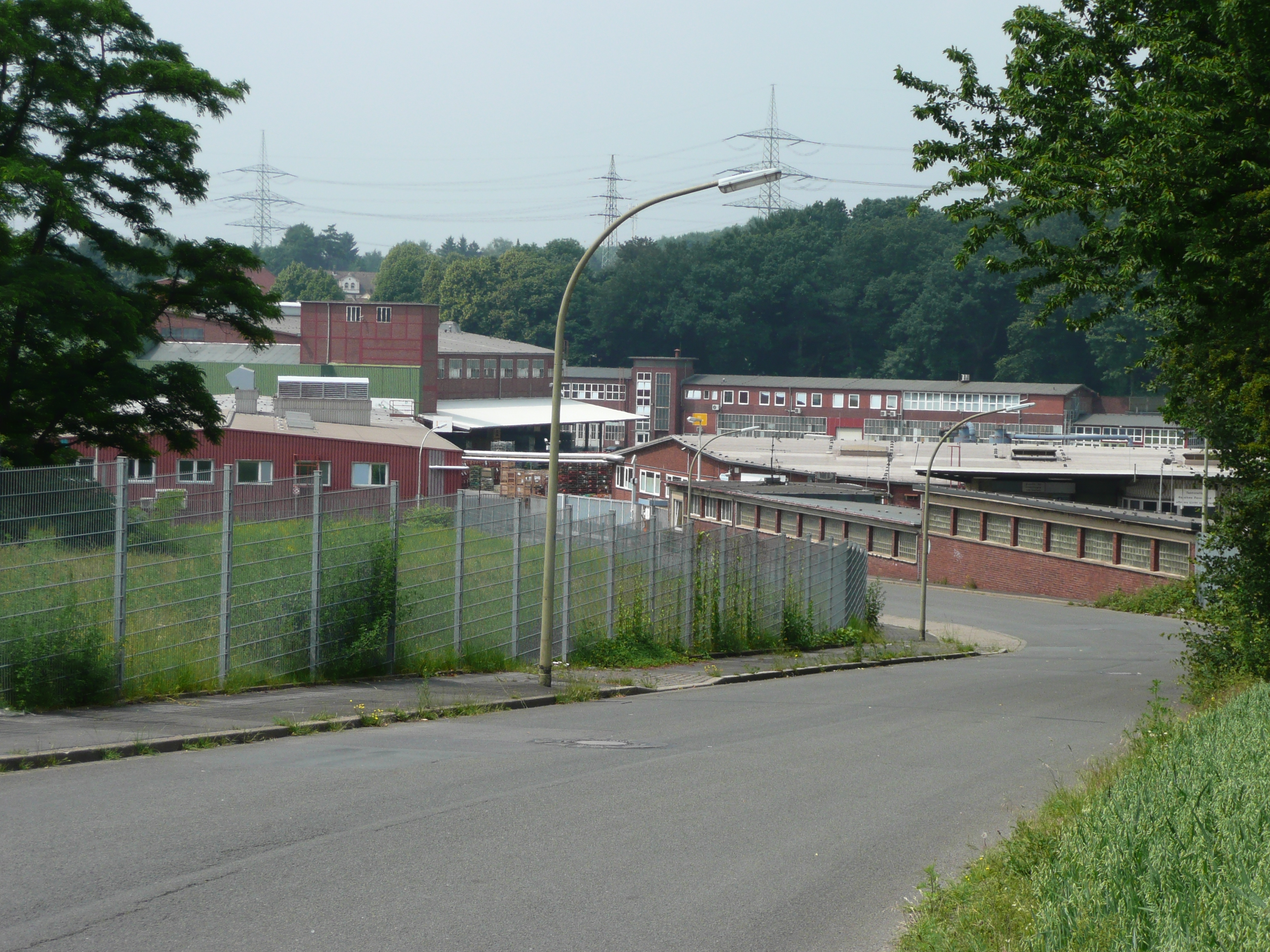 Pilkington, Hersteller von Fahrzeugglas